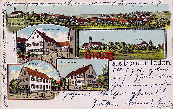 Donaurieden in Erbach bei Ulm AK um 1900 16:56, 13. Aug 2005 Enslin 559 x 354 (95822 Byte) (Donaurieden in Erbach bei Ulm AK um 1900 PD-old )